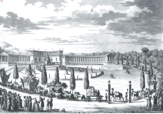 Optocht van de veroverde wilde dieren op het Champs de Mars ter gelegenheid van het vrijheidsfeest te Parijs, 28 Juli 1798 (met olifanten) of op 16 augustus 1796 zonder de twee olifanten Hans en Parkie, maar met tien voertuigen.